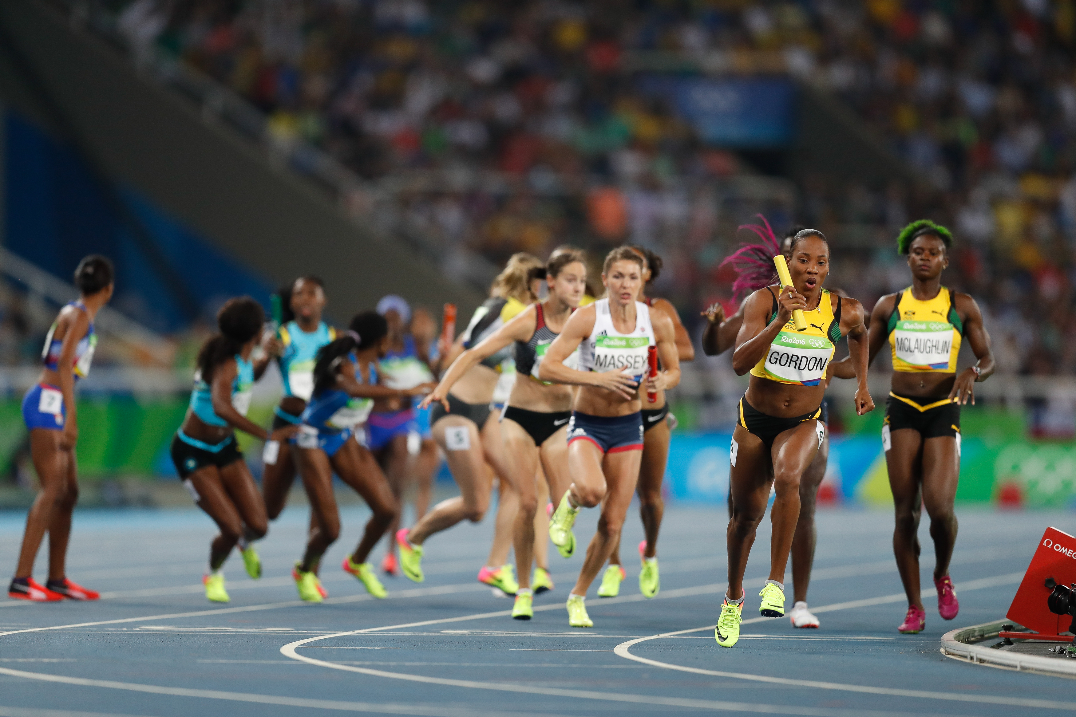 Rio de Janeiro - Eliminatórias do revezamento 4 x 400m nos Jogos Rio 2016, no Estádio Olímpico (Fernando Frazão/Agência Brasil)